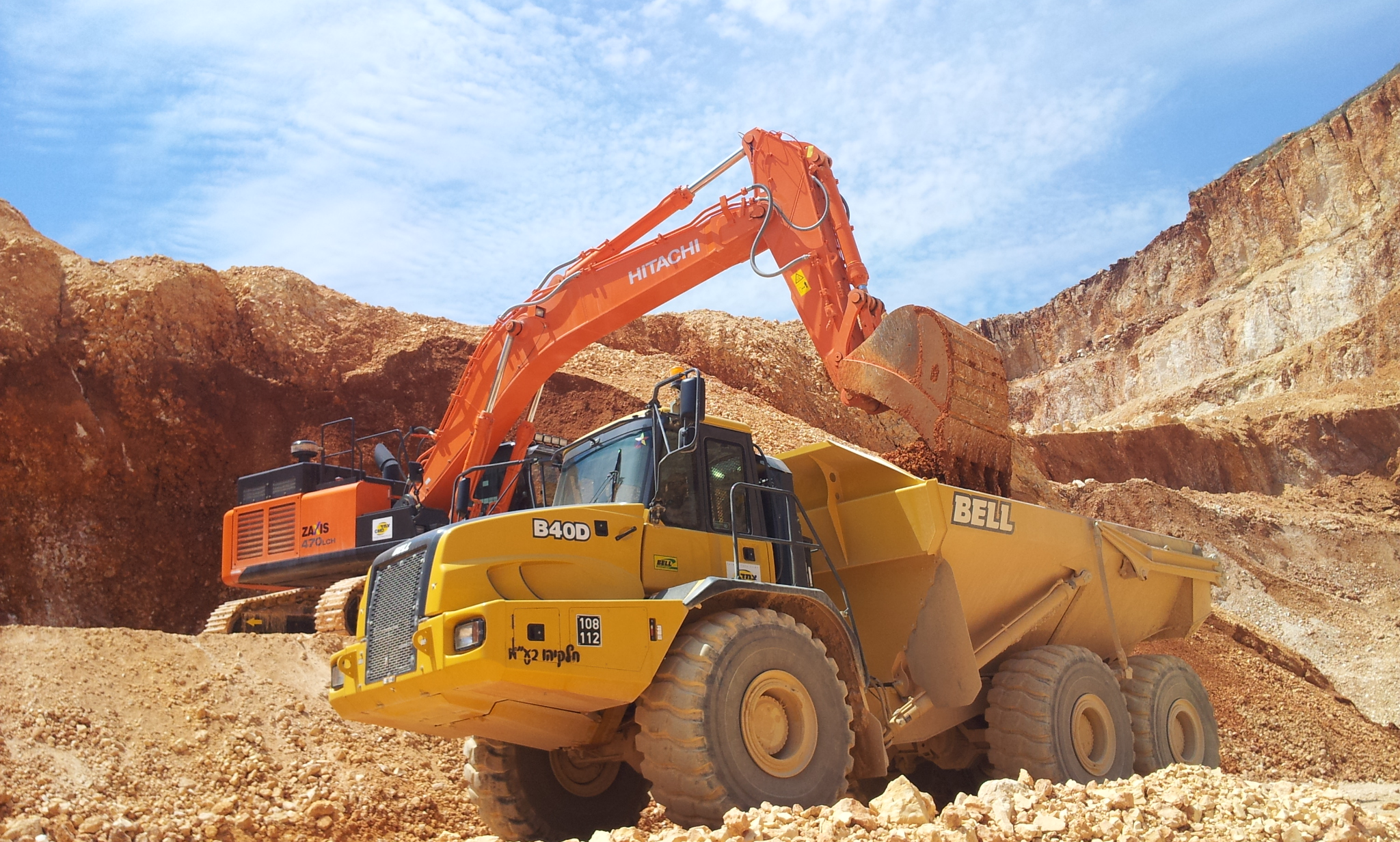 מחפר HITACHI ZX470 חופר עפר ומעמיס אותו על משאית